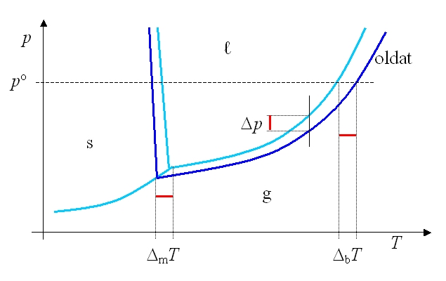 A víz és egy oldat fázisdiagramja vázlatosan, a híg oldatok törvényeinek értelmezéséhez.